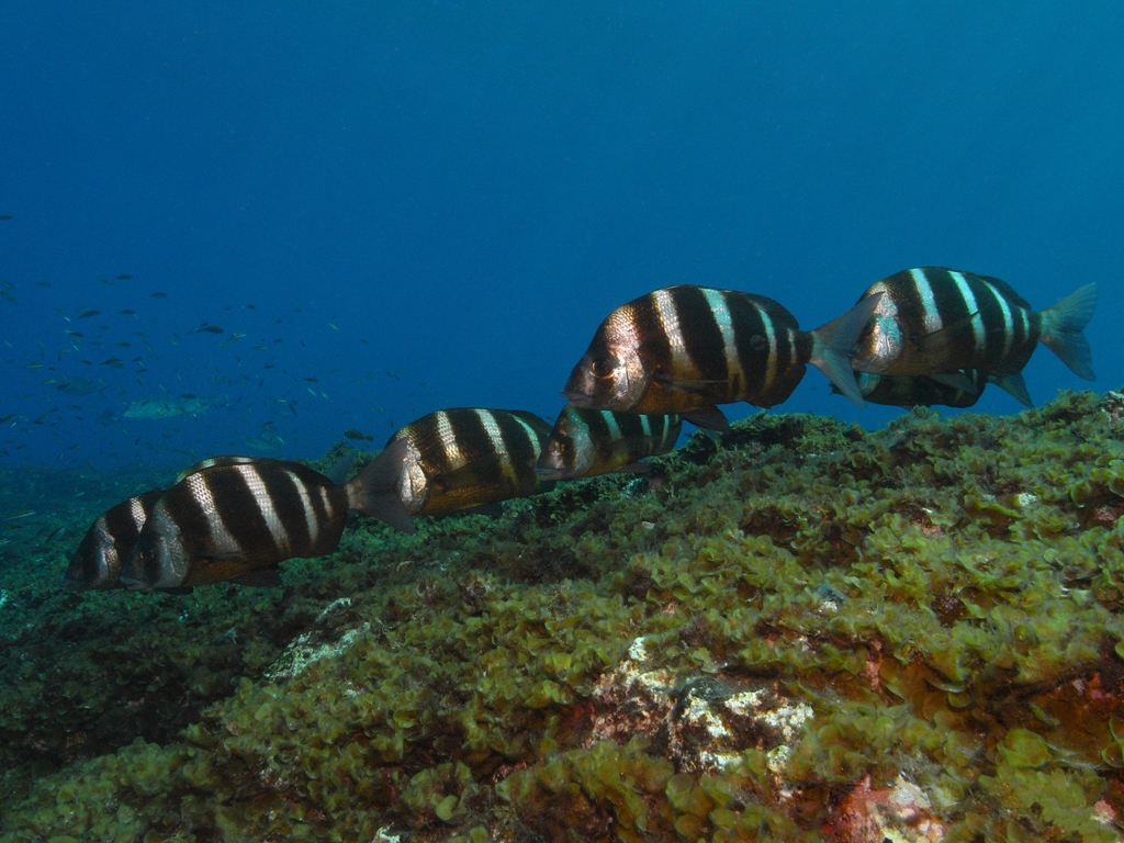 Diplodus cervinus cervinus - Zebra seabream / Sargo breado / Sar tambour, el Hierro.